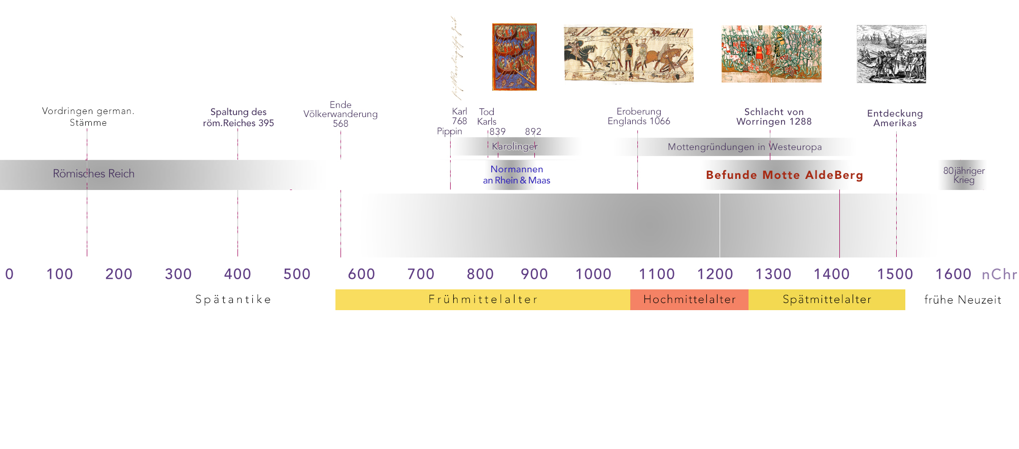 Zeitschiene zur Kläerung von Begrifflichkeiten